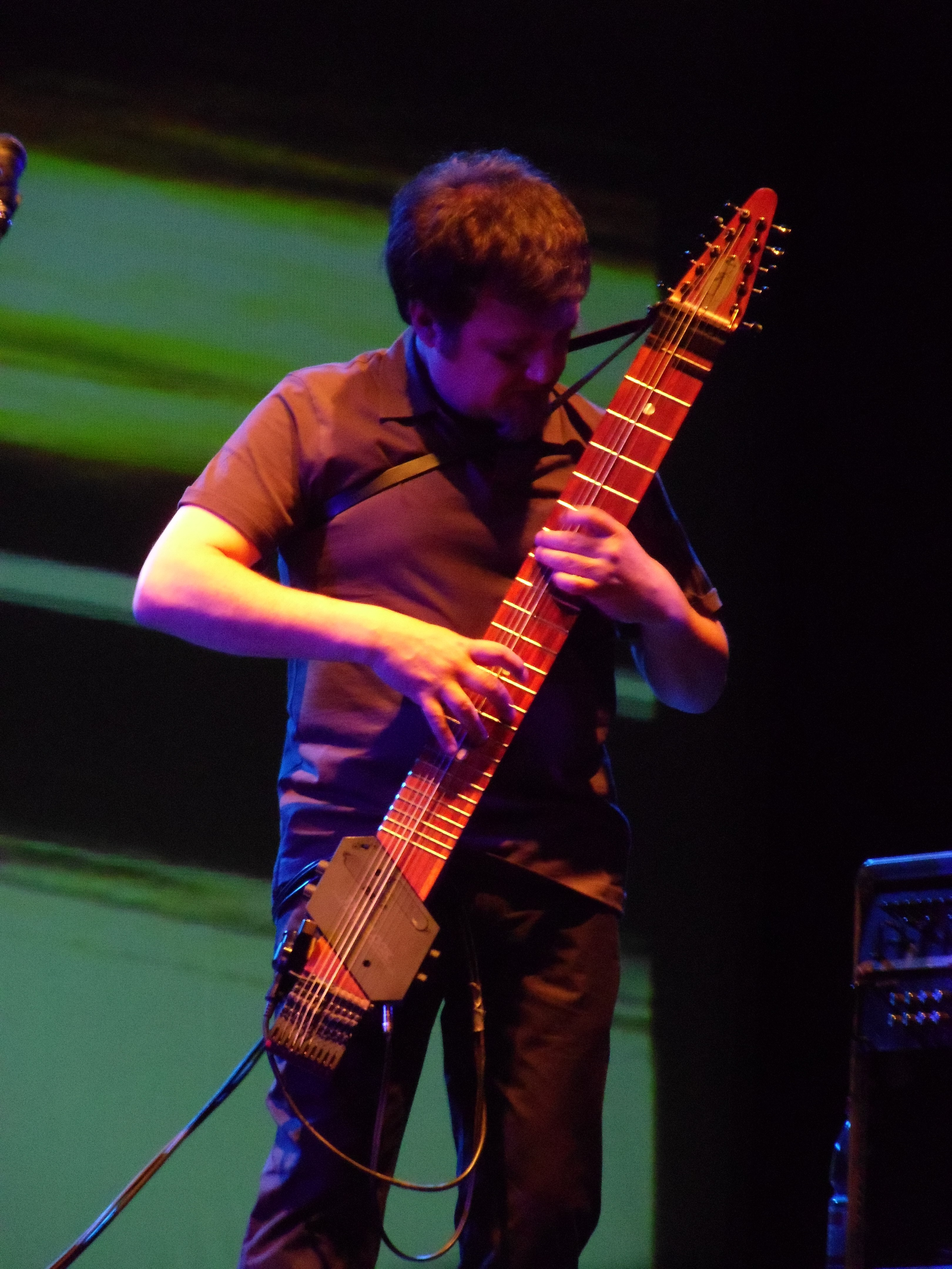 Silvio Paredes ejecutando el Chapman Stick en el Centro Gabriela Mistral, Santiago de Chile, diciembre de 2010.